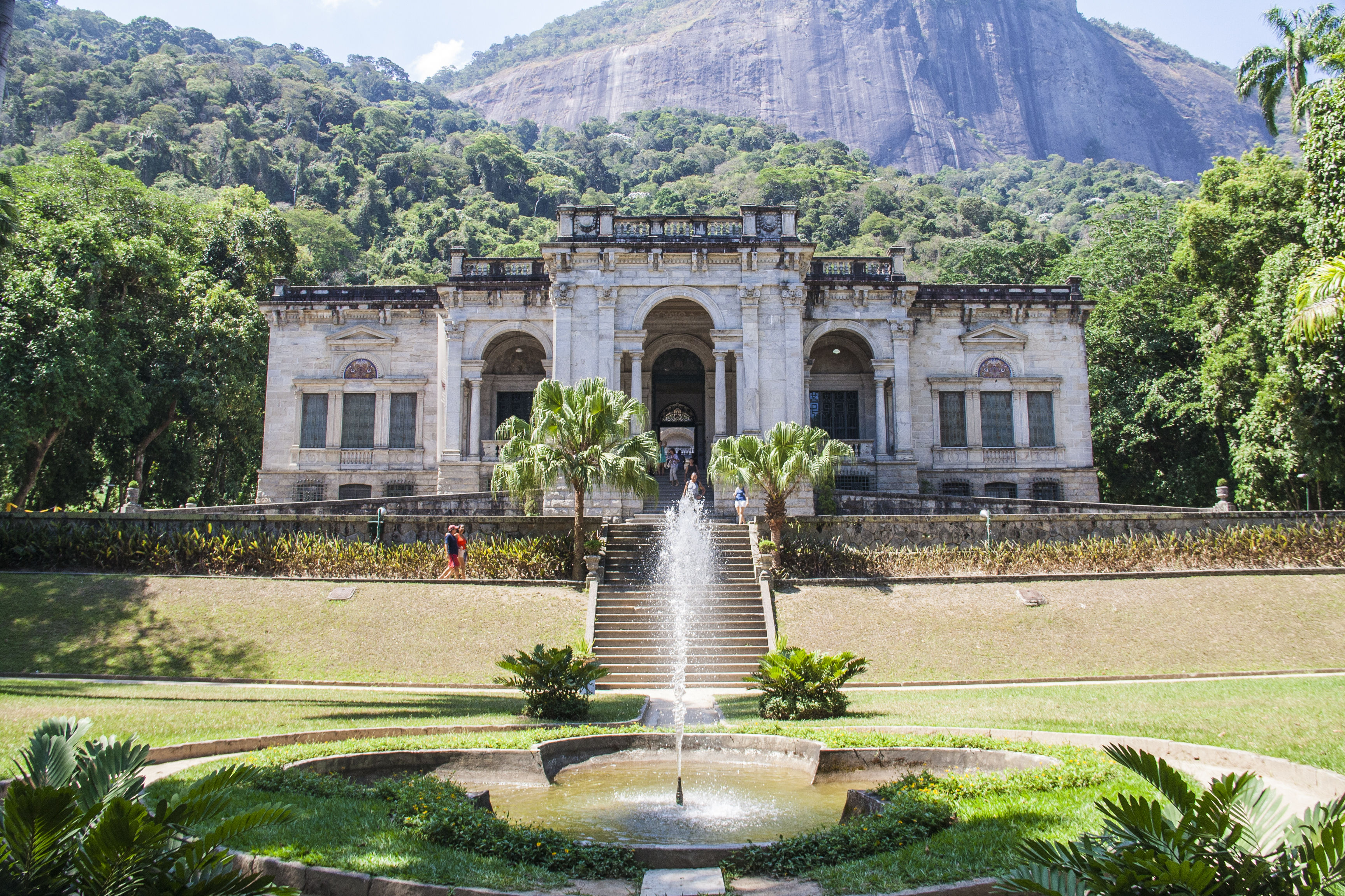 Parque Henrique Lage (Conjunto Paisagístico)